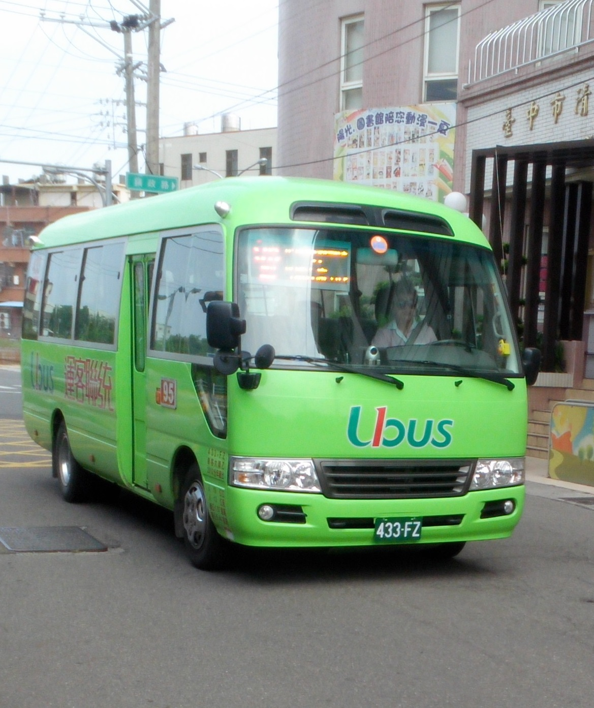 中台灣客運租用統聯客運433-FZ行駛台中市公車95路副線，行駛地點為台中市清水區南社路。